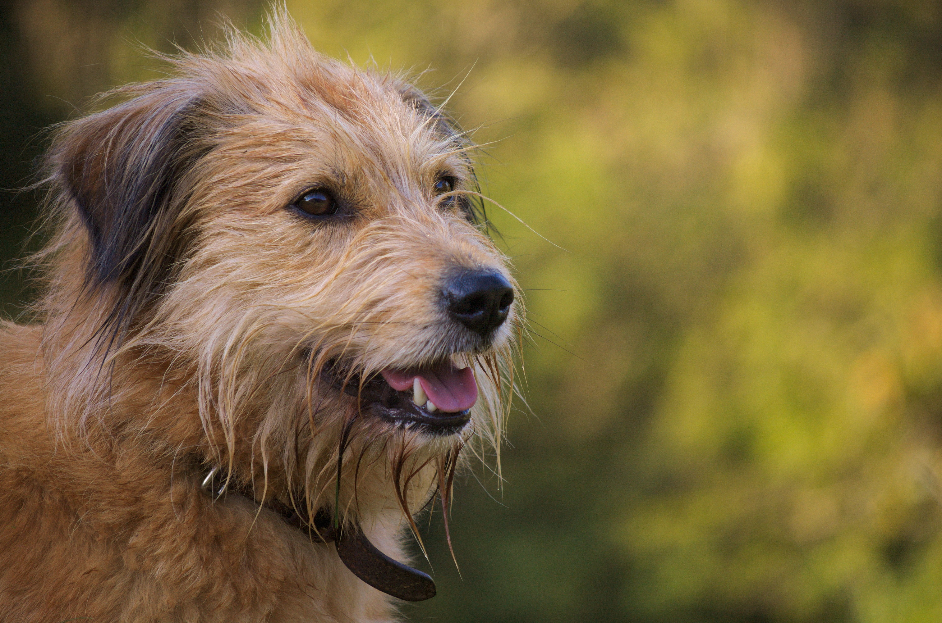 Euskal artzain txakurra. Burua.